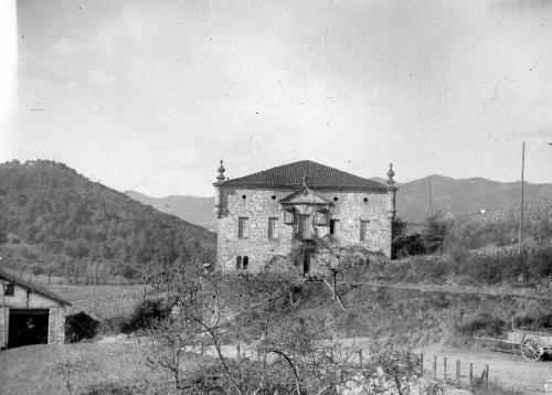 Fachada de la casa-torre Moyua, con sus escudos de armas NOTAS: En el negativo, en el reverso, manuscrito, de mano del autor "Bergara"